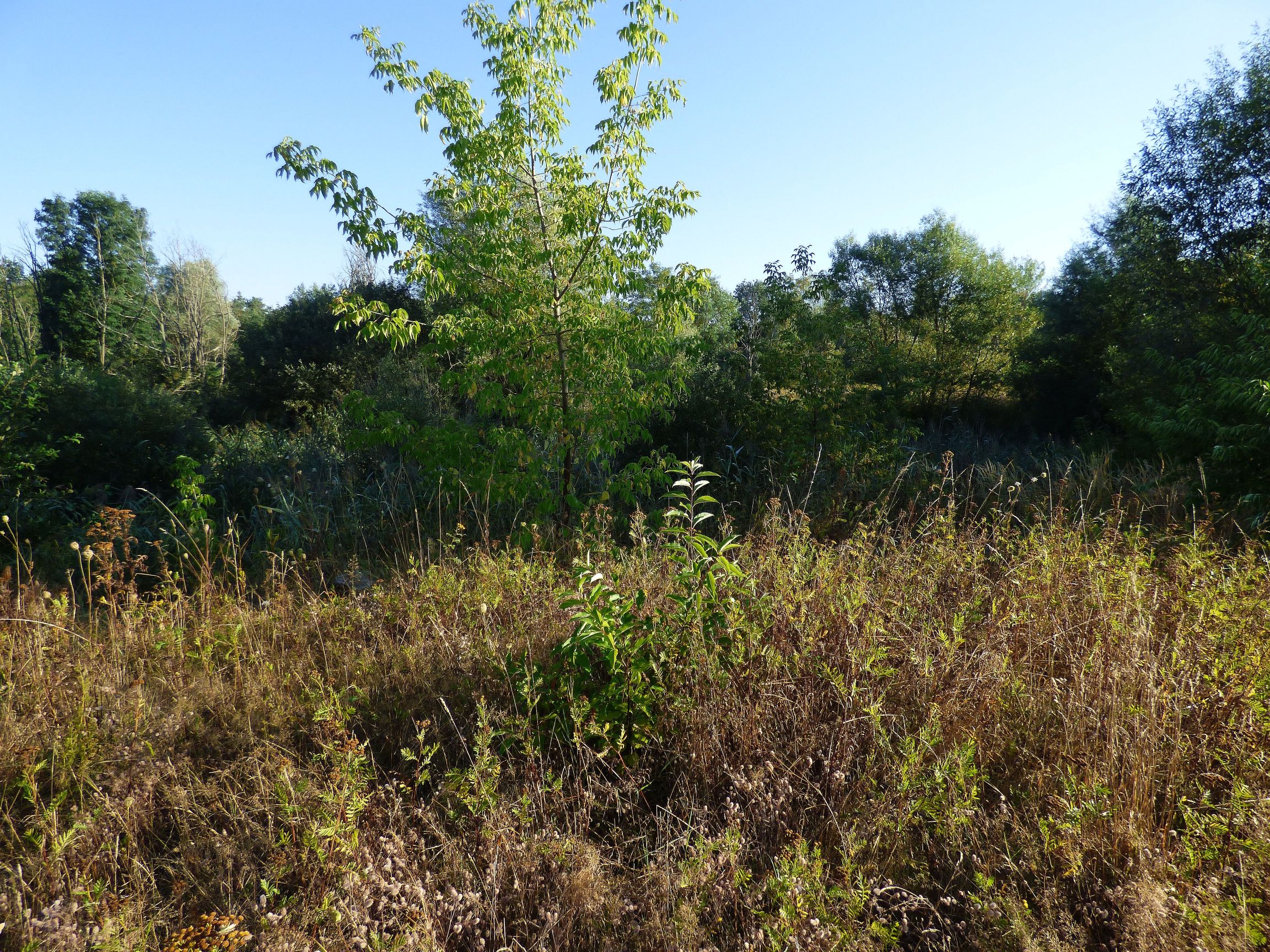 Naturschutzgebiet Lönnewitzer Heide nahe der einstigen Ortslage von Alt Lönnewitz